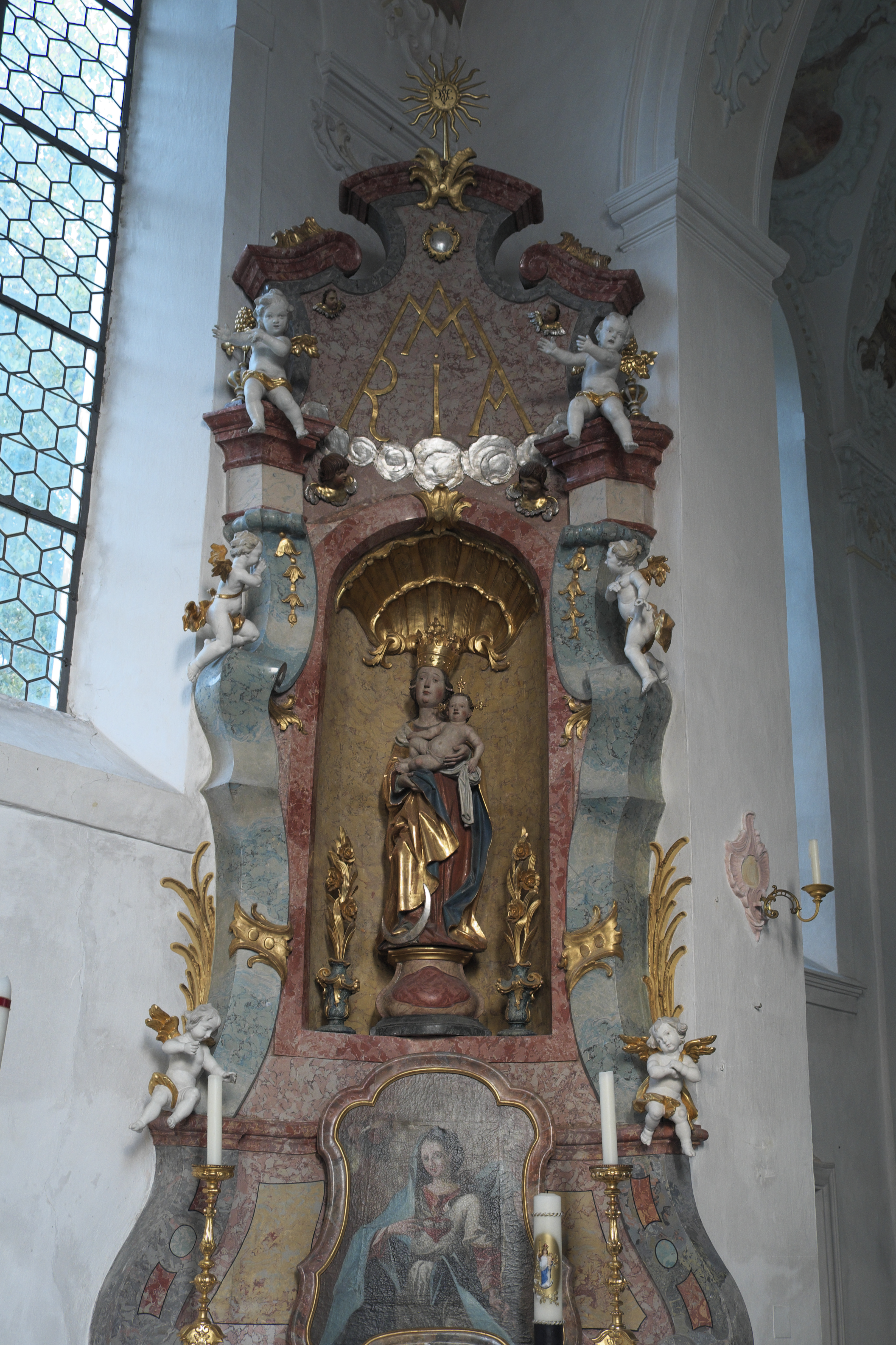 Katholische Pfarrkirche St. Martin in Sachsenried (Schwabsoien) im Landkreis Weilheim-Schongau (Bayern/Deutschland), nördlicher Seitenaltar